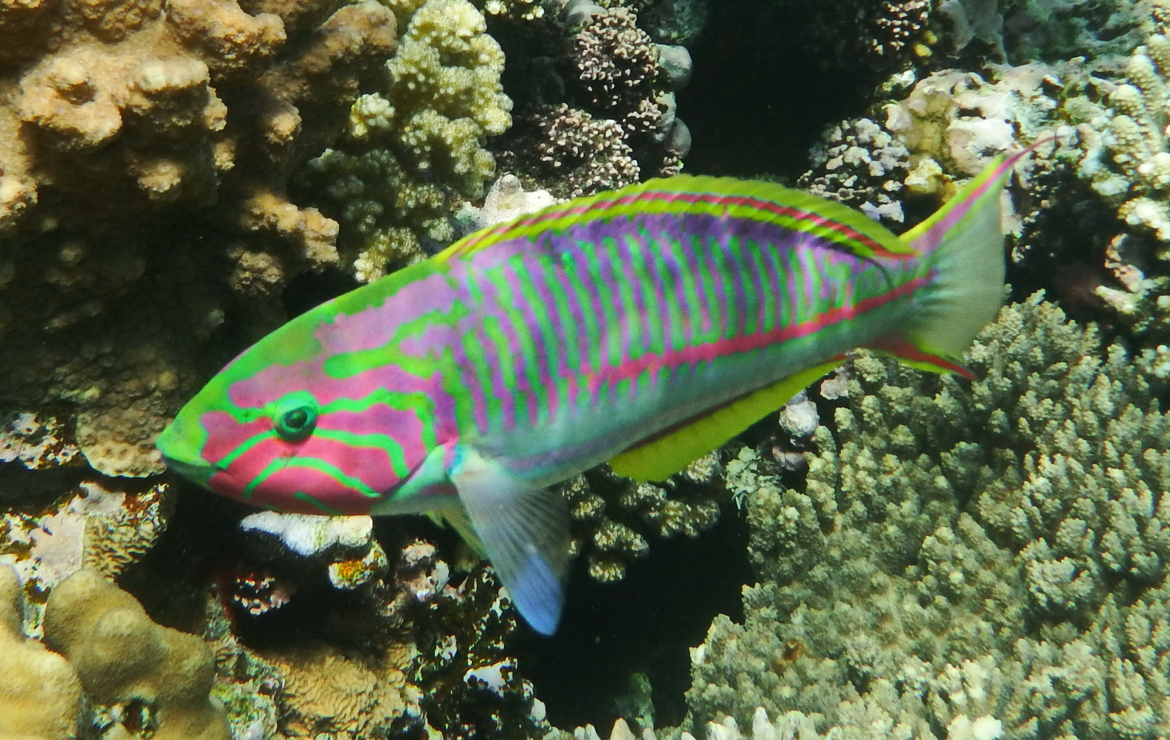 Thalassoma rueppellii (Thalassoma klunzingeri) im Roten Meer.